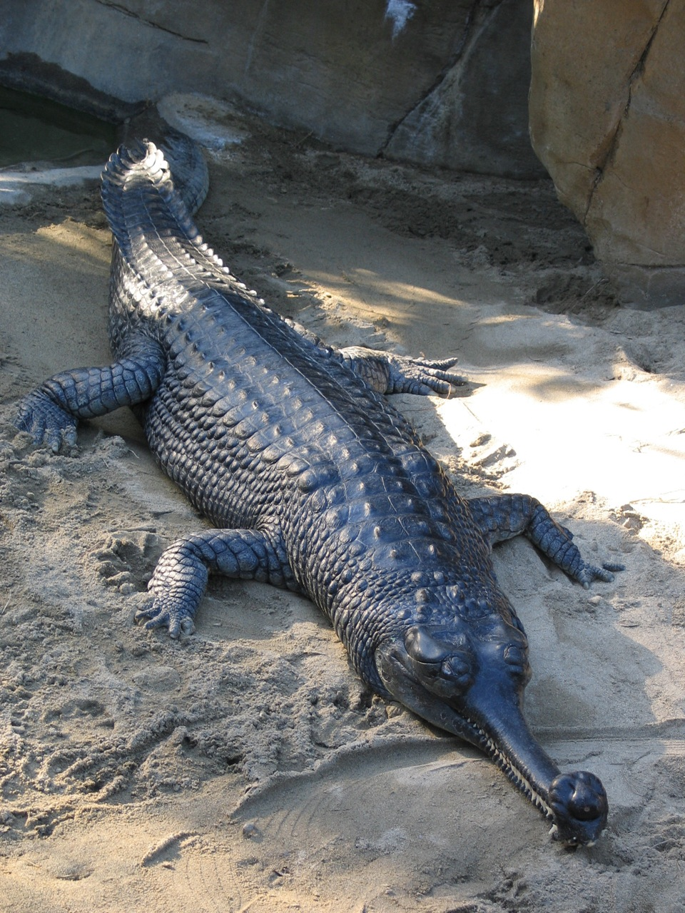 Gharial in San Diego Zoo